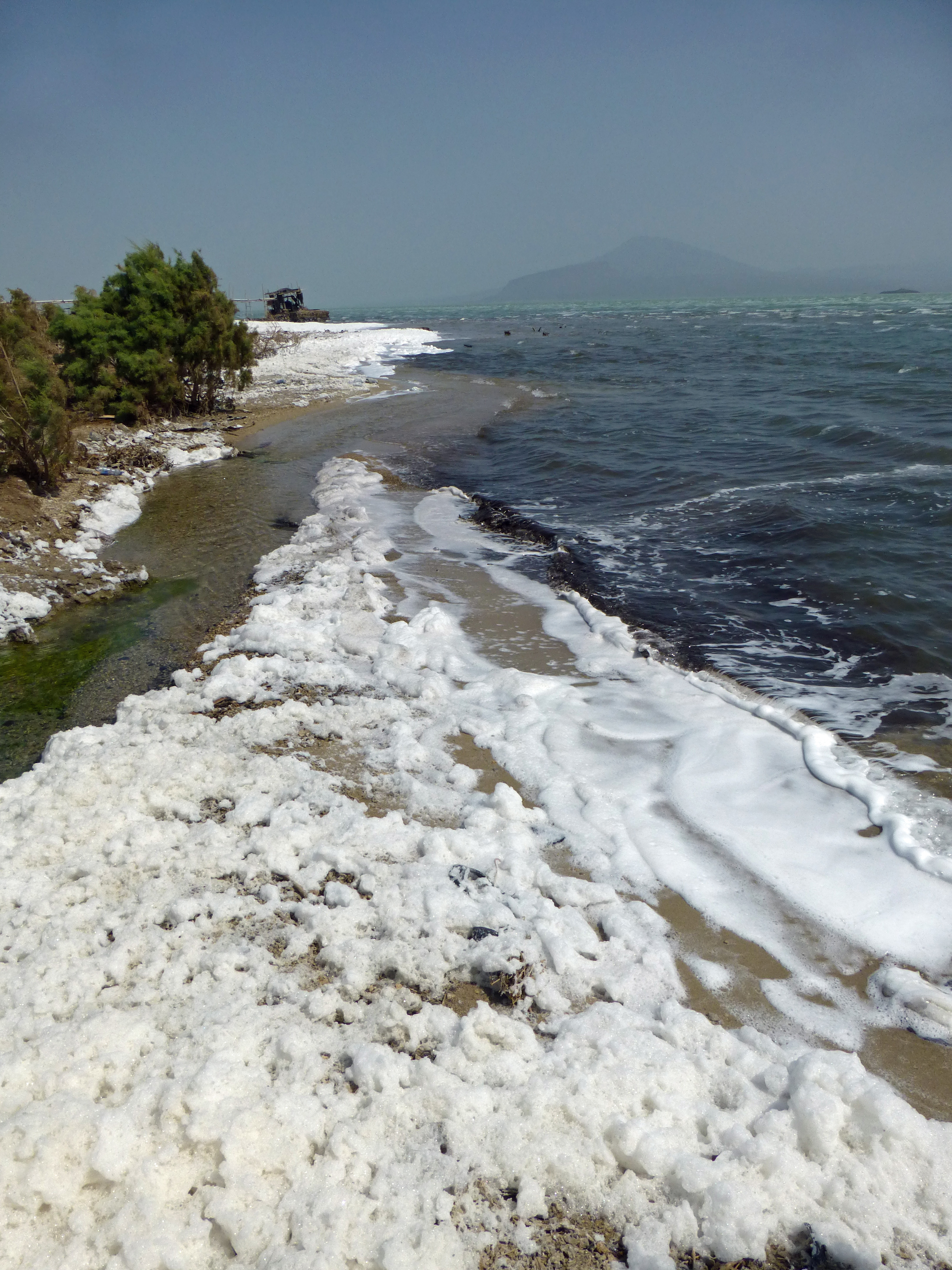 Lac salé Afdera (ou Afrera) au nord de l'Ethiopie (Région Afar)